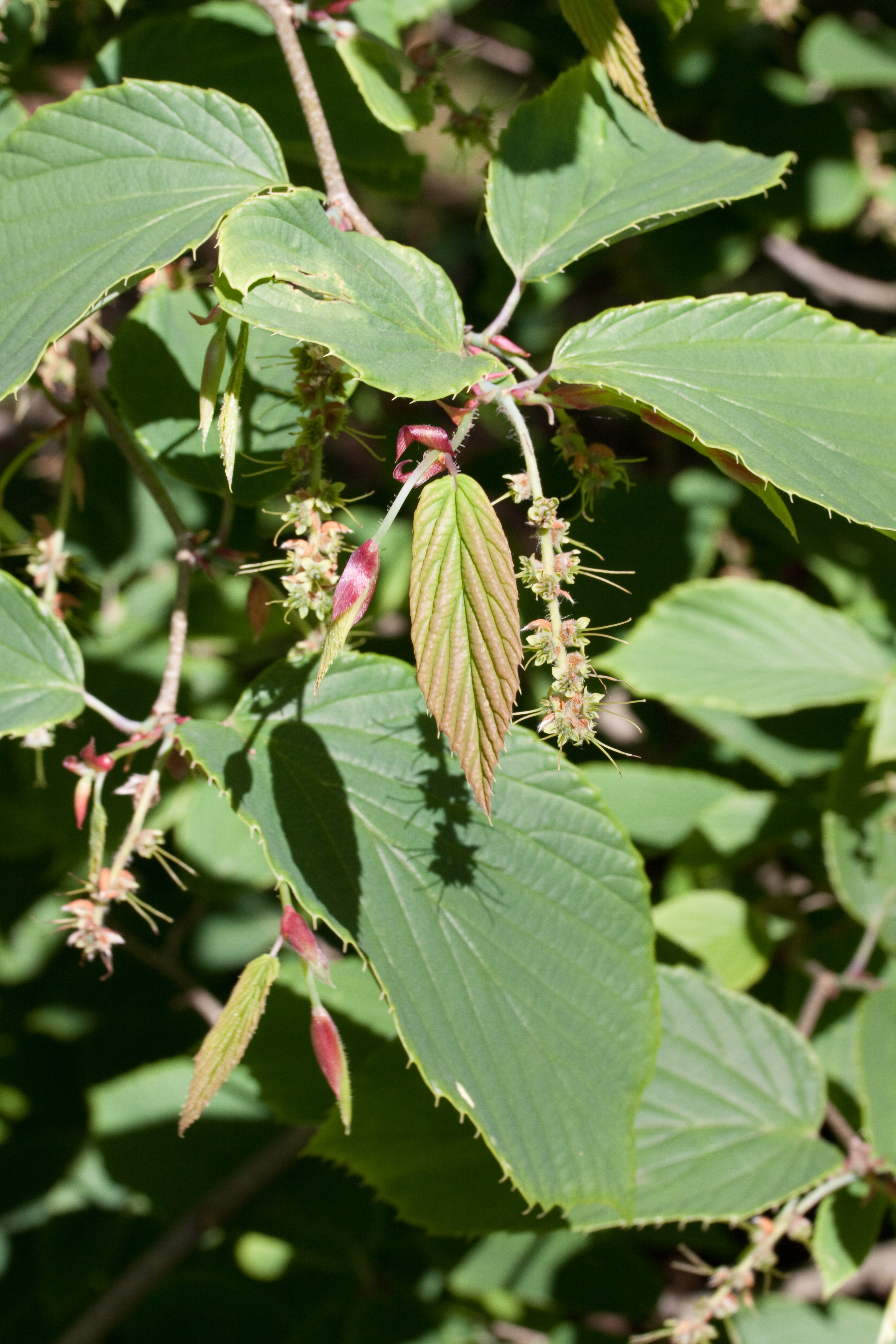 Fin de floraison de Corylopsis glabrescens - Jardin botanique de Strasbourg - France